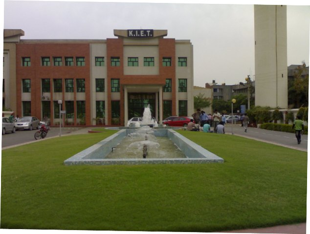 KIET Entrance